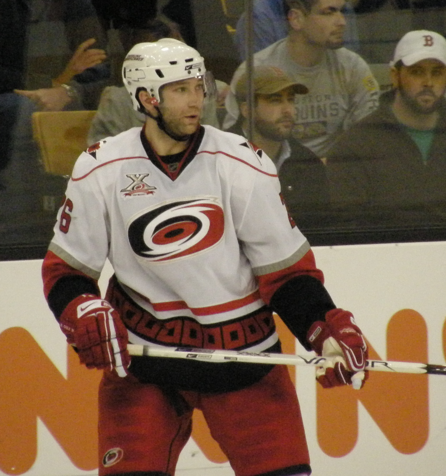 #26 Erik Cole (Right Winger)